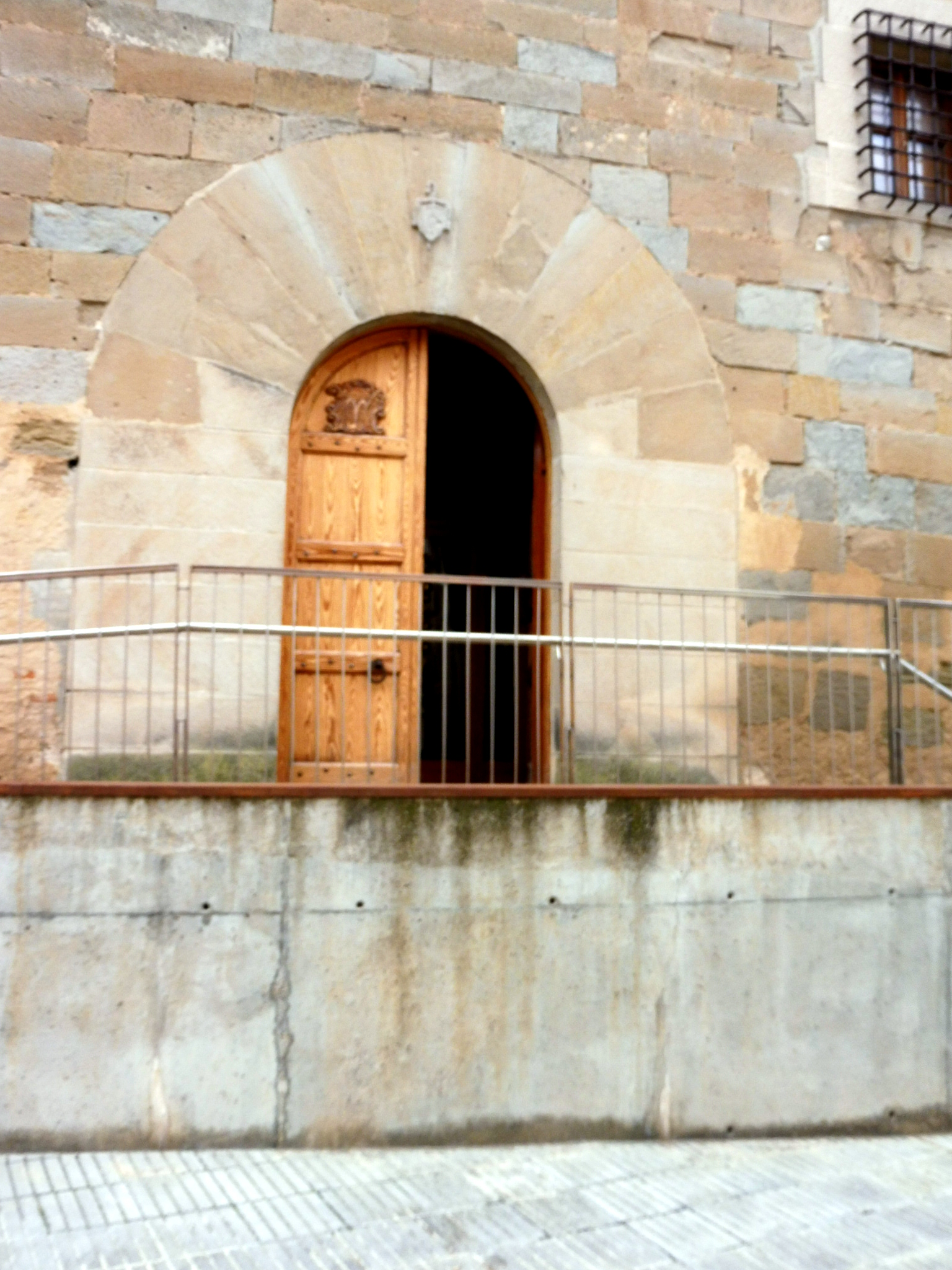 La Panera (Castellserà): portada